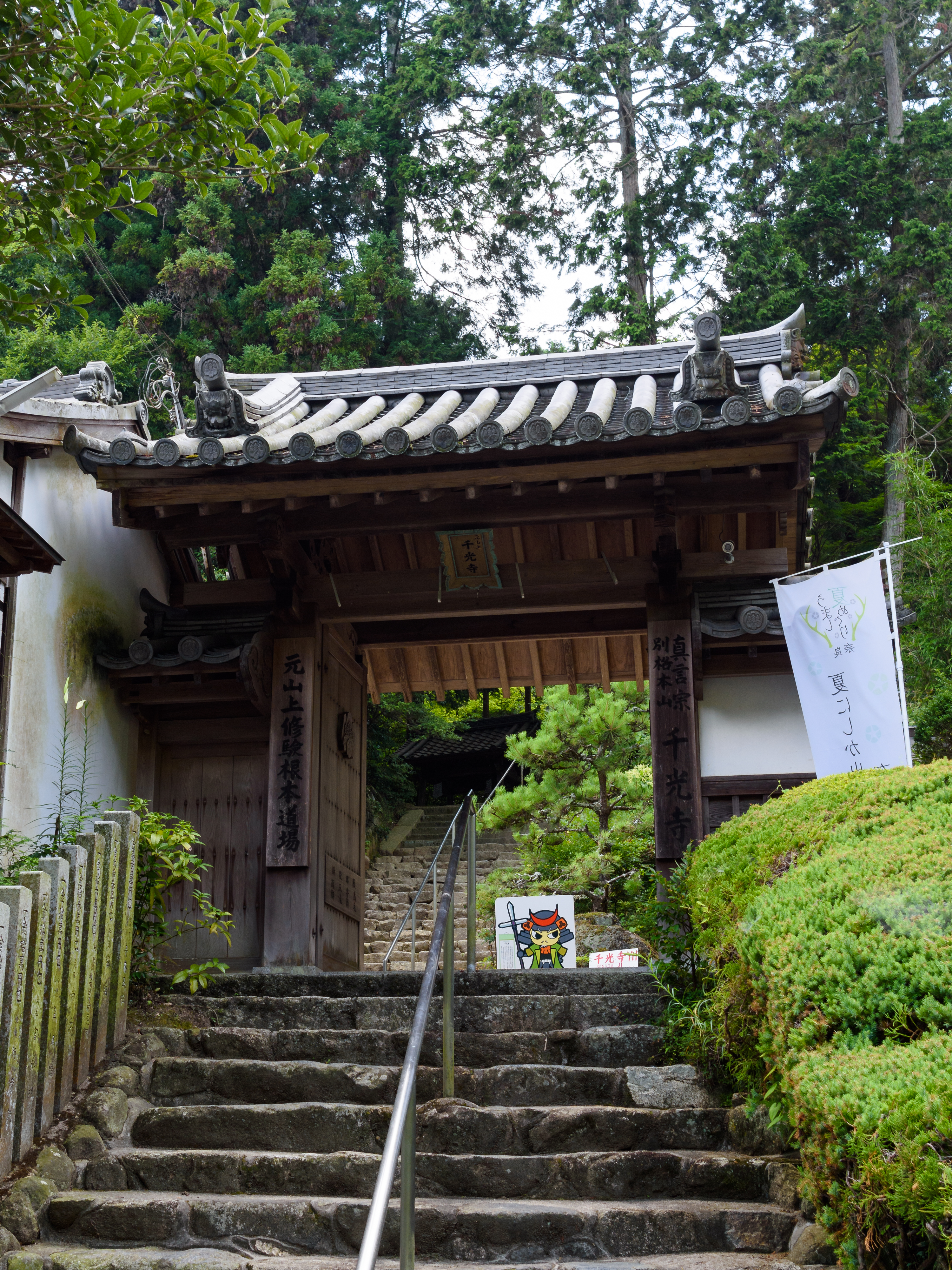 元山上千光寺の山門